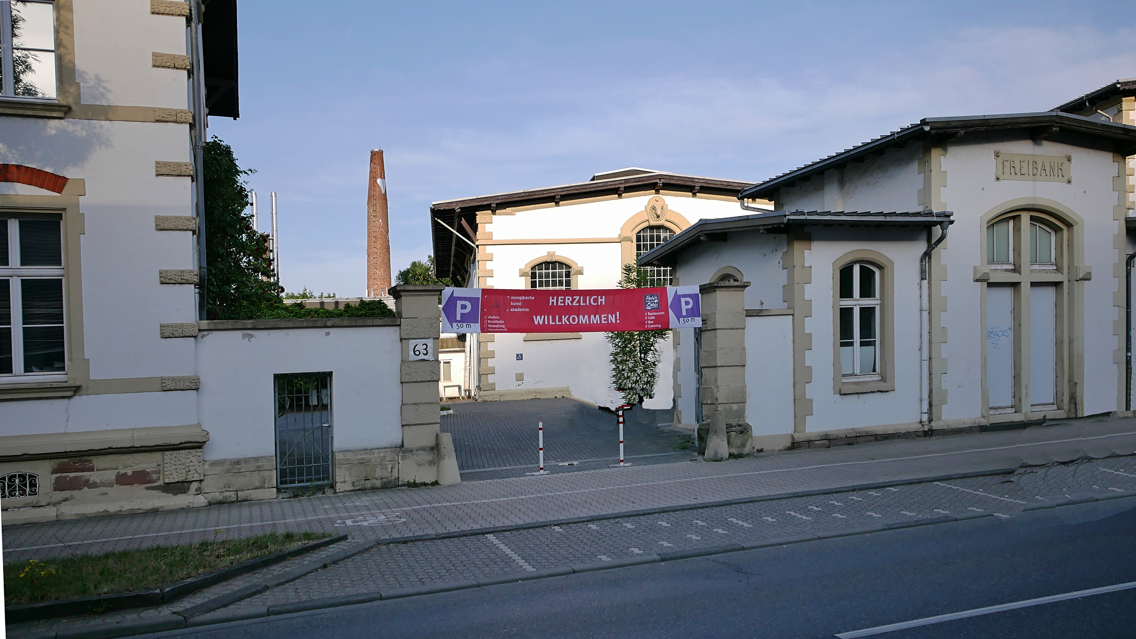 Europäische Akademie für Bildende Kunst in Trier. Das Gebäudeensemble wurde ursprünglich als Schlachthof erbaut und 1977 umgenutzt.